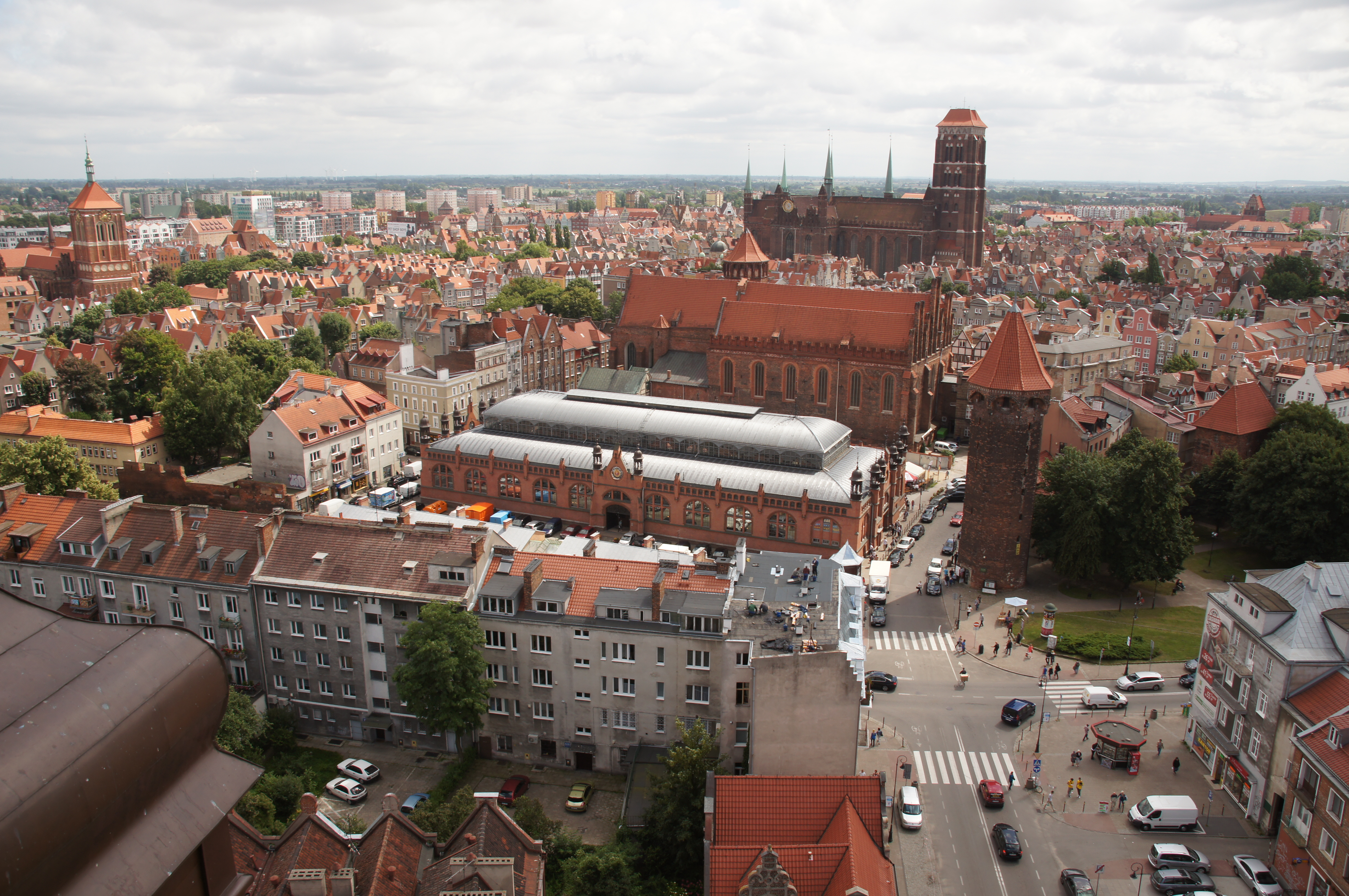 Gdańsk Główne Miasto - widok z wieży kościoła św. Katarzyny